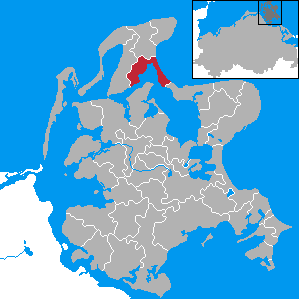 Breege, Landkreis Rügen, Mecklenburg-Vorpommern